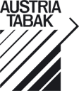 Logo von Tabakregie